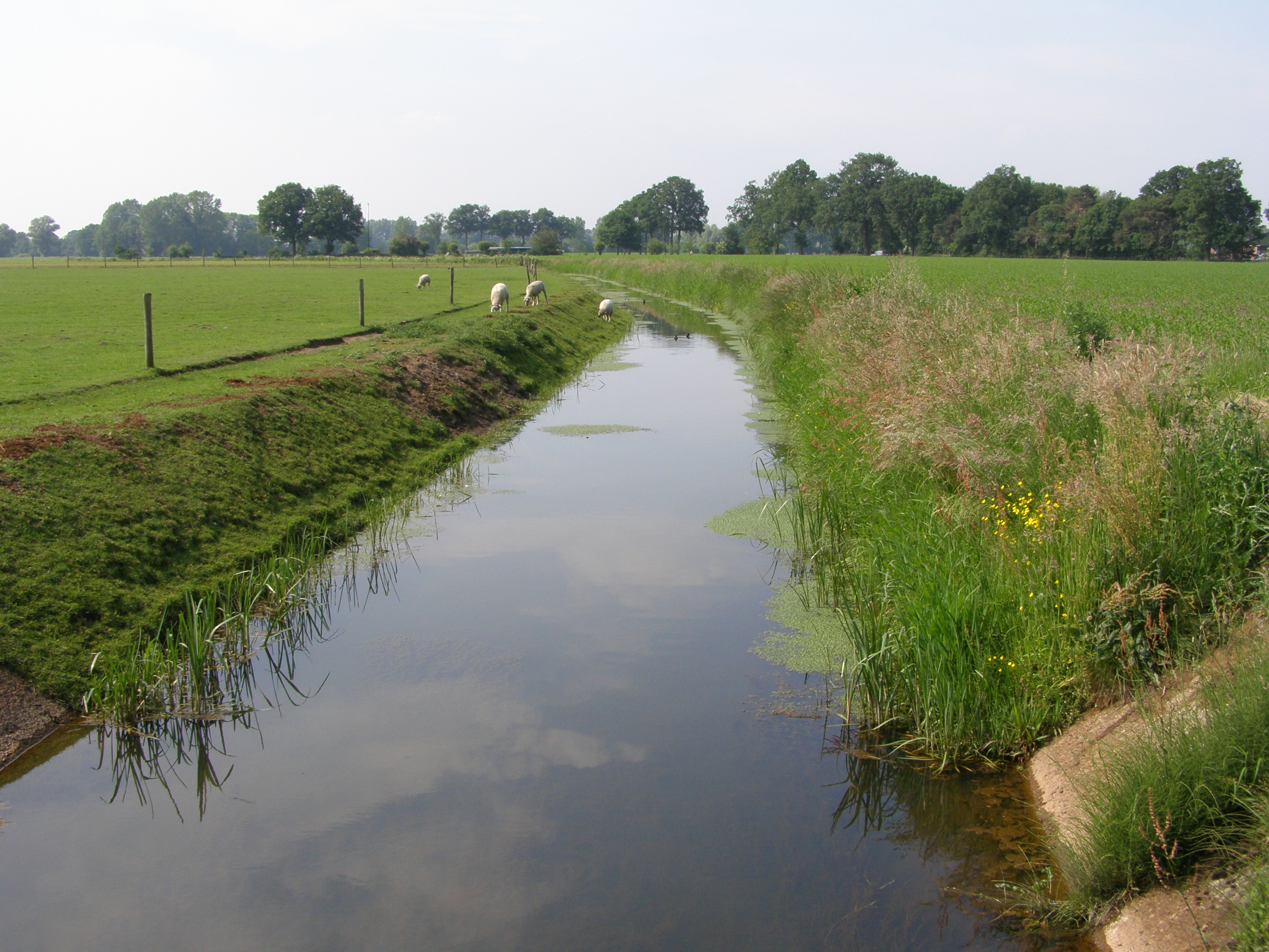 De Potlee is een watergang bij Goor in de Nederlandse provincie Overijssel. eigen werk.